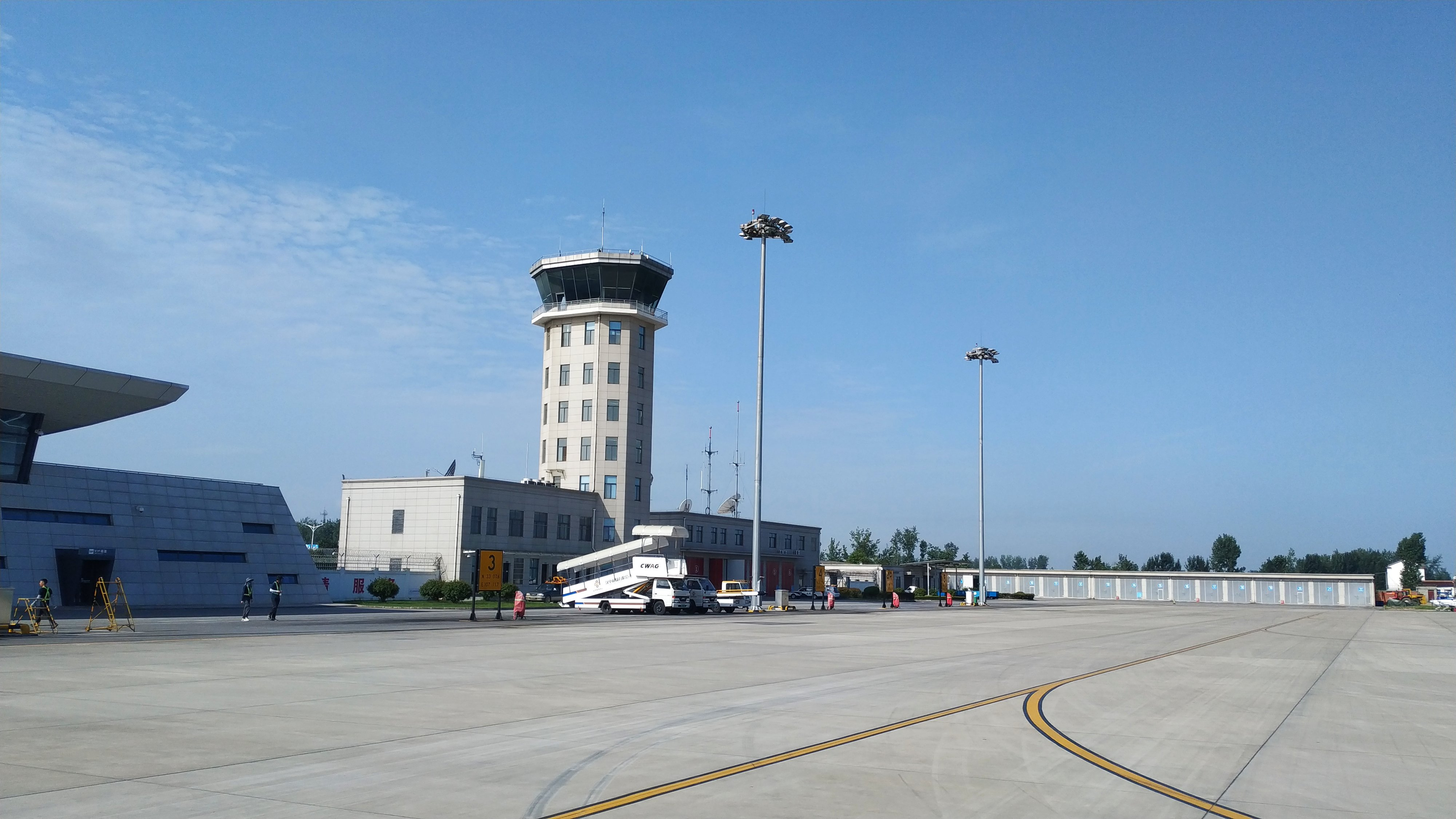 中文（中国大陆）: 汉中机场塔台